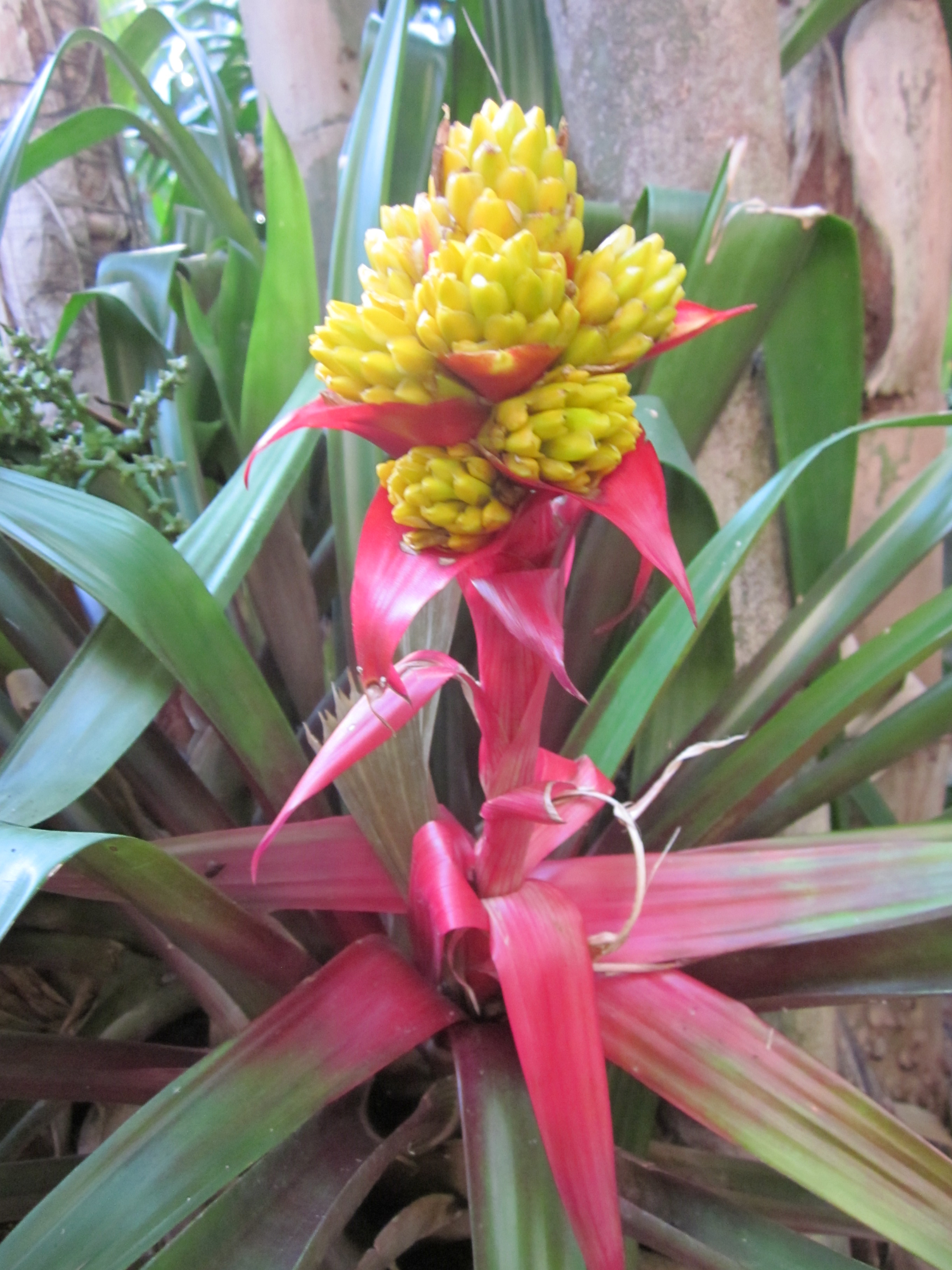 it is not Aechmea mertensii , Orto botanico di Roma